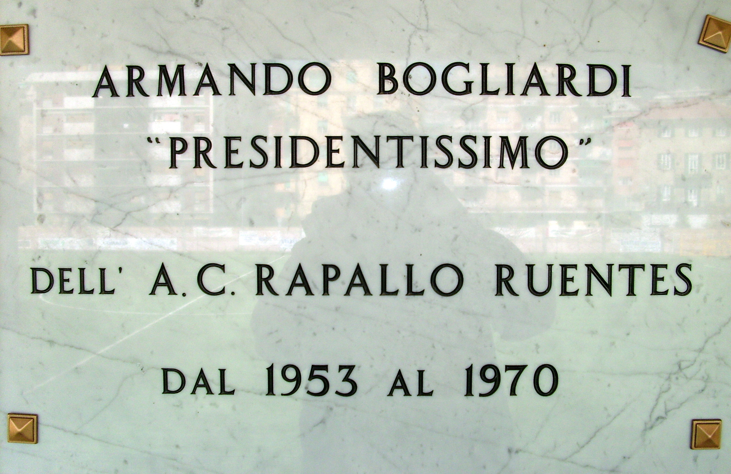 Stadio Comunale Umberto Macera - Targa Armando Bogliardi